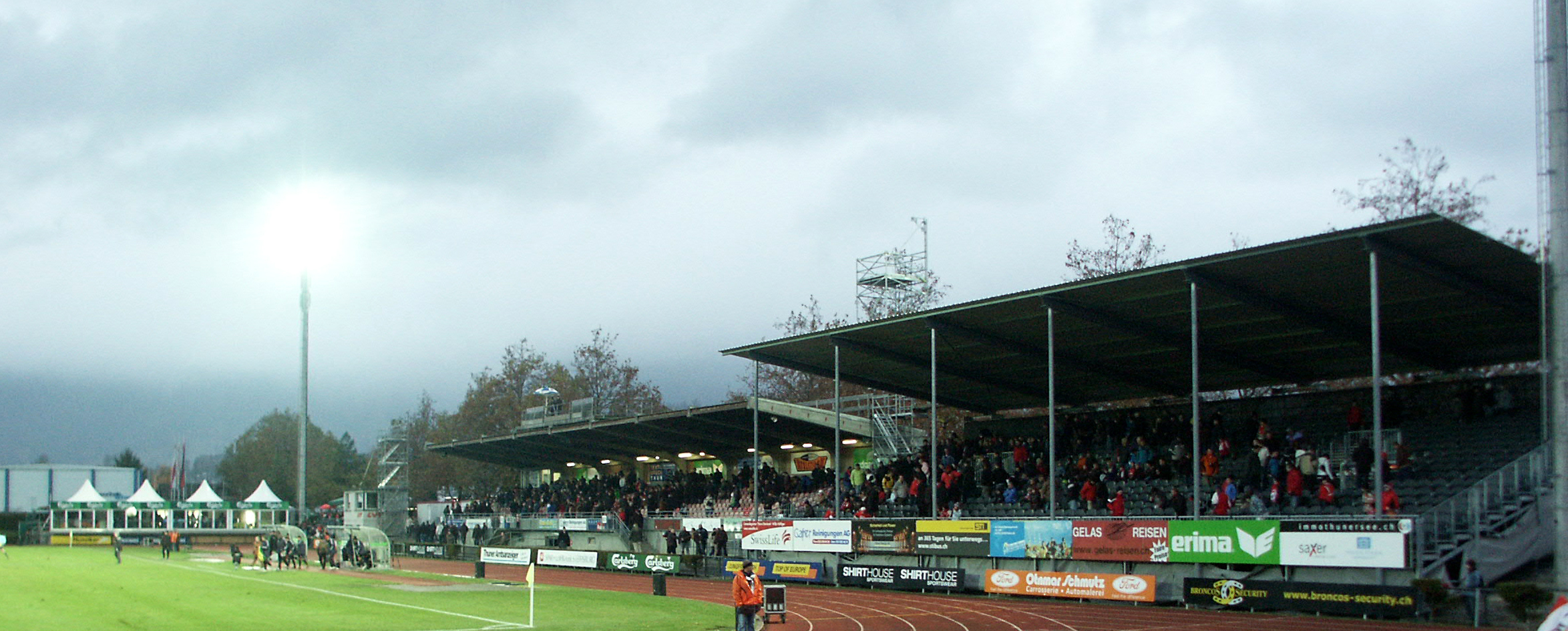 Stadion Lachen, Thun, Schweiz/Switzerland